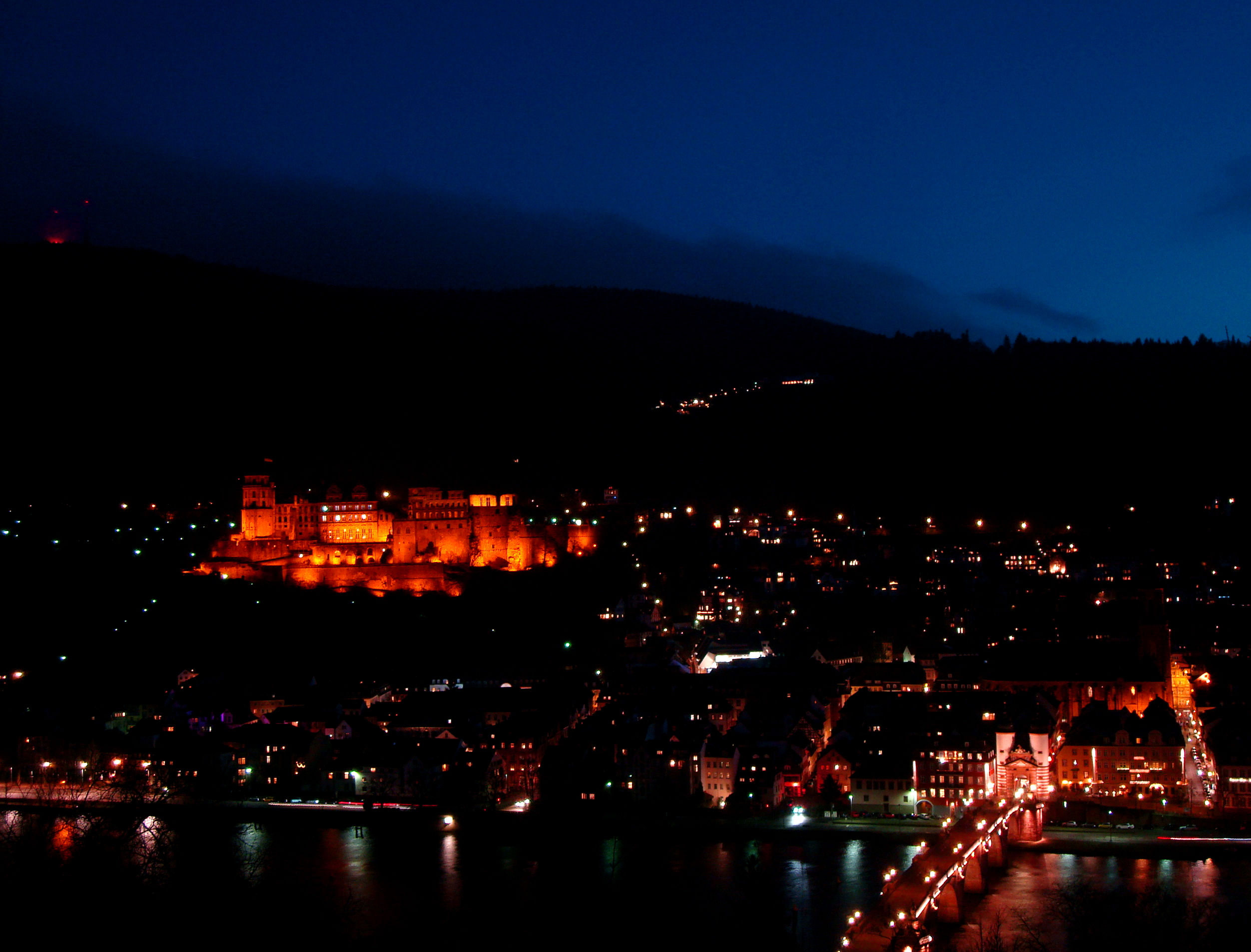 Blick vom Philosophenweg auf Heidelberg mit der Alten Brücke und dem Schloss bei Nacht